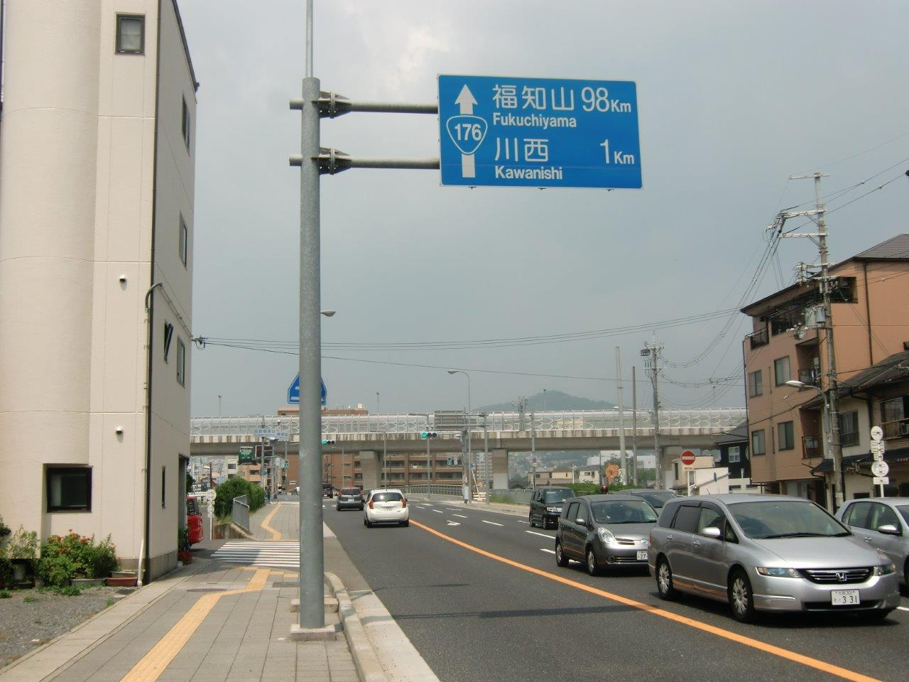 呉服橋東詰より兵庫県側に撮影